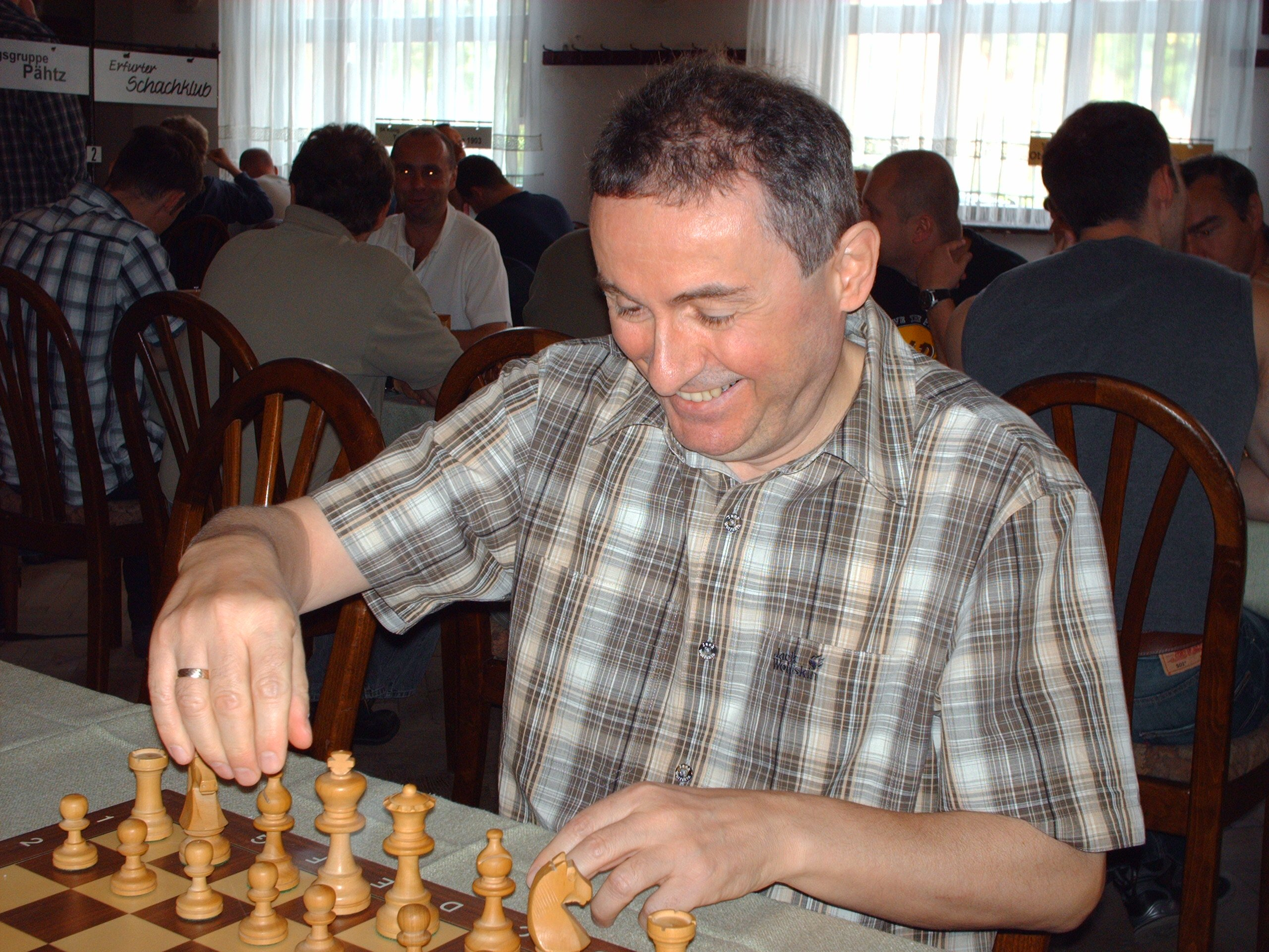 Rainer Knaak am 24. Juni 2007 beim 43. Rosengarten-Pokalturnier in Forst (Lausitz)